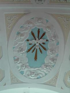 simo 2006